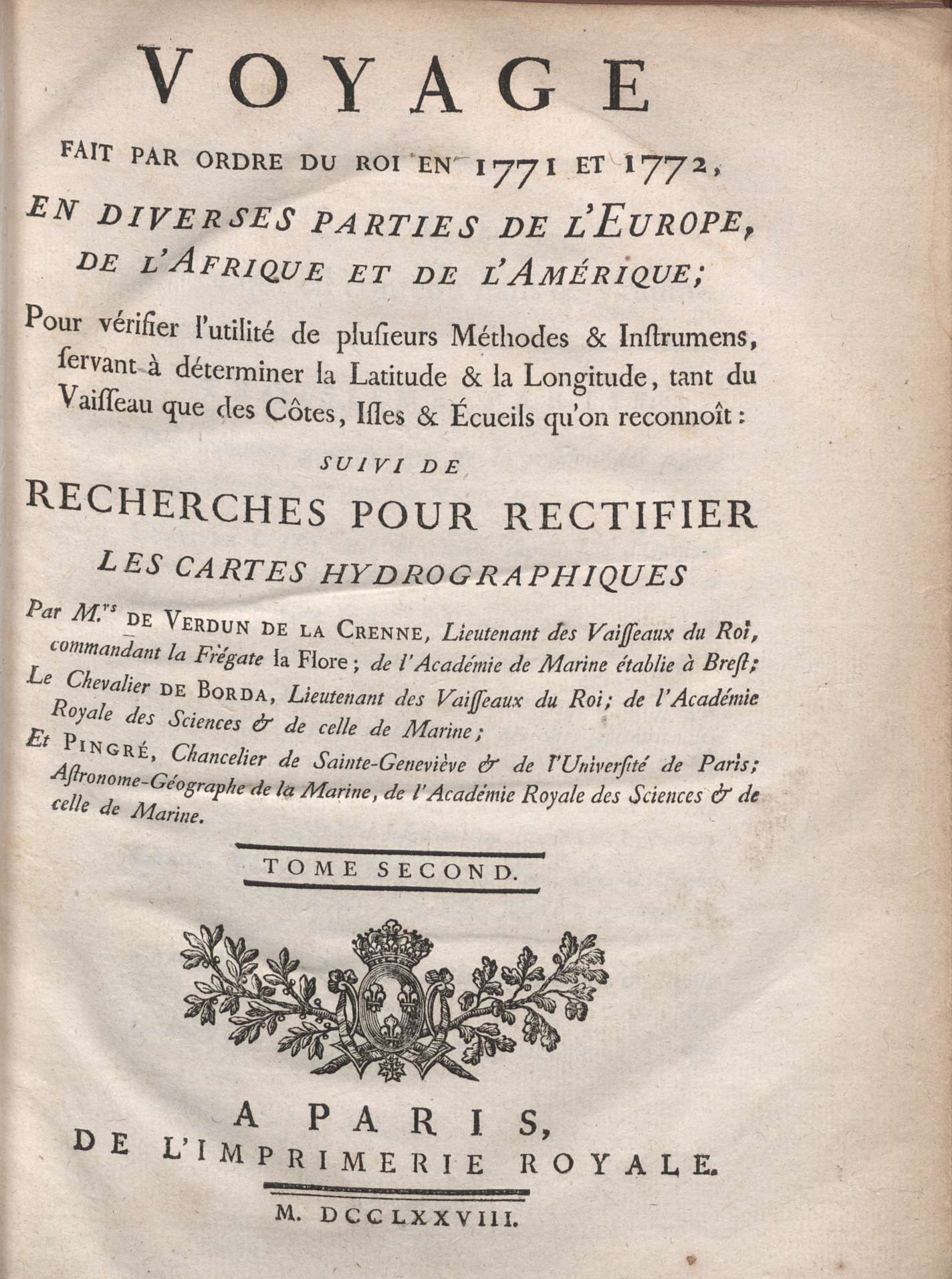 Frontespizio di Voyage fait par ordre du roi